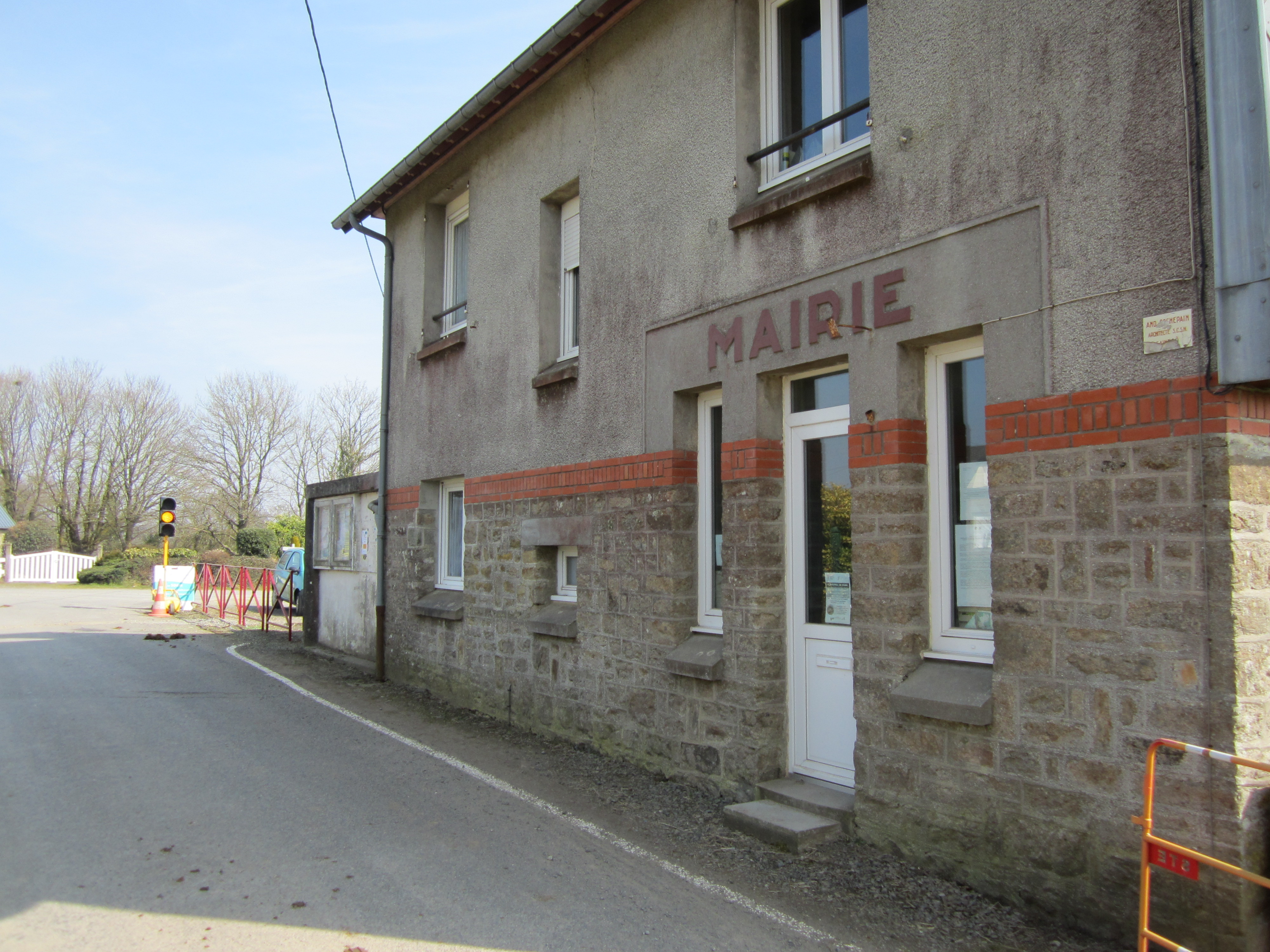 Église Saint-Pierre de Boisyvon